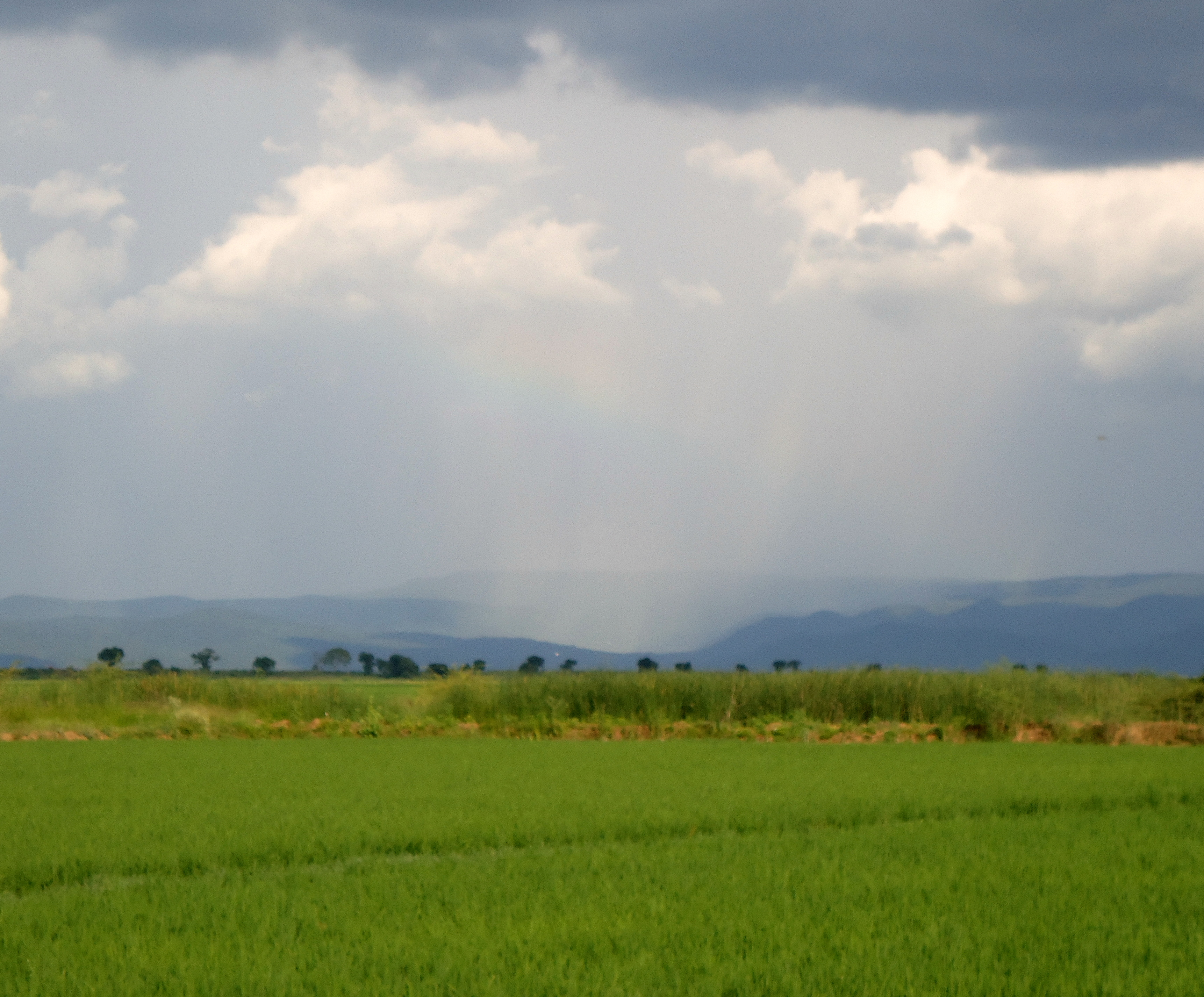 NALLAMALA MOUNTAINS!ALLAGADDA,AP